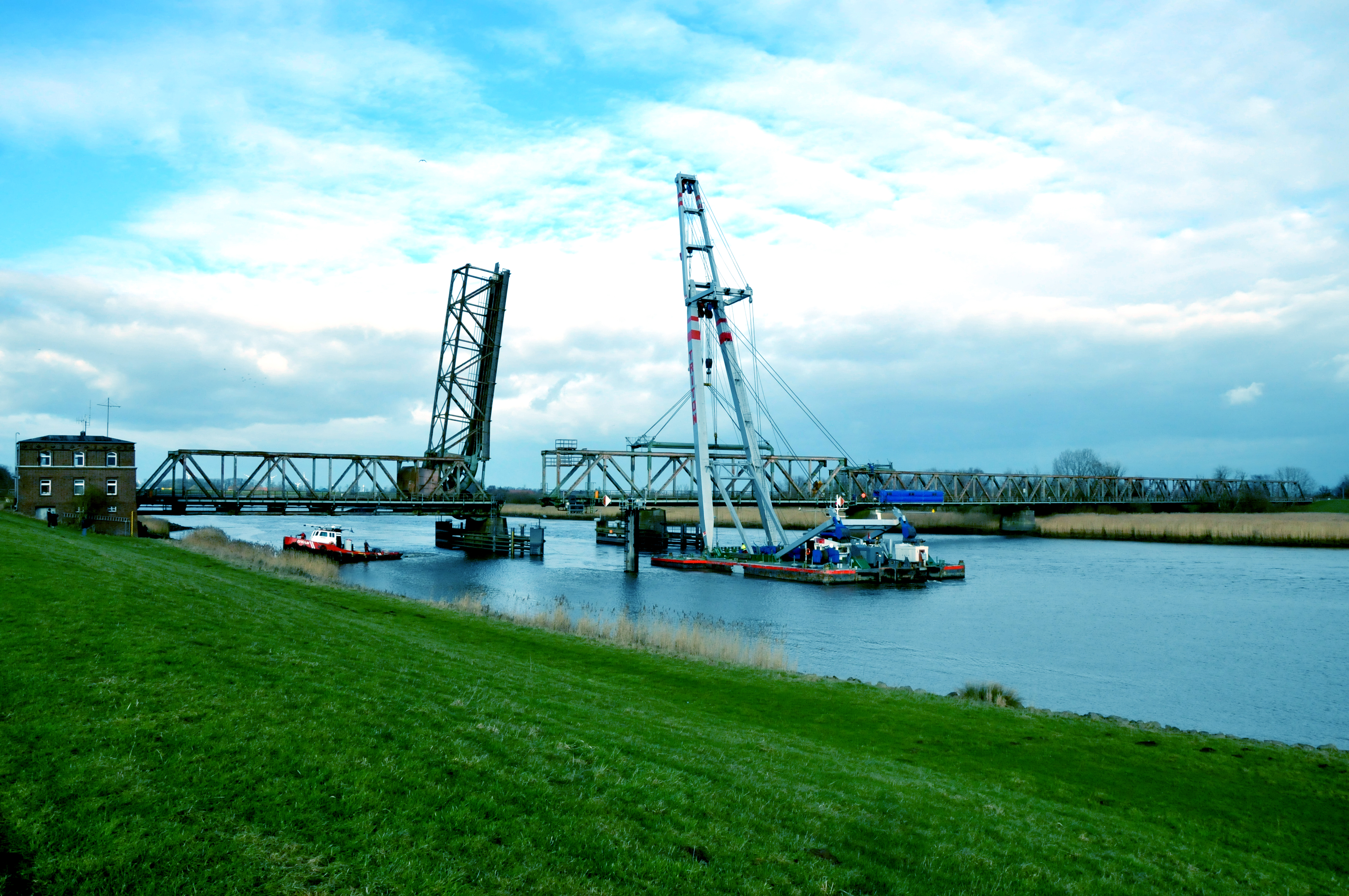 Een deel van de Friesenbrücke bij Weener in de hefbok Triton van Rederij Wagenborg om een grotere doorgang in de hoofdvaargeul voor de passage van de AIDAstella te verbreden.